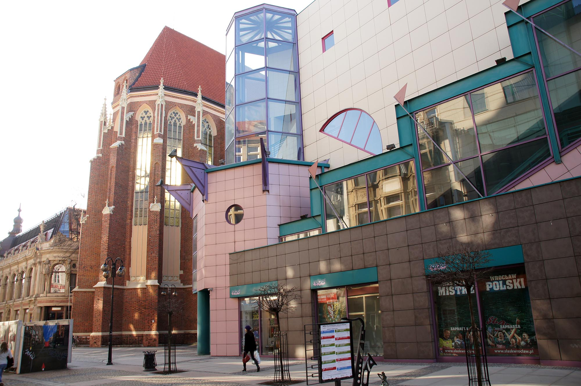 Wrocław, kościół klasztorny augustianów eremitów, ob. par. p.w. śś. Wacława, Doroty i Stani…, 1351-1381, ok. 1400, 3 ćw. XV, 1720-1730, 1892-1899, 1927-1936